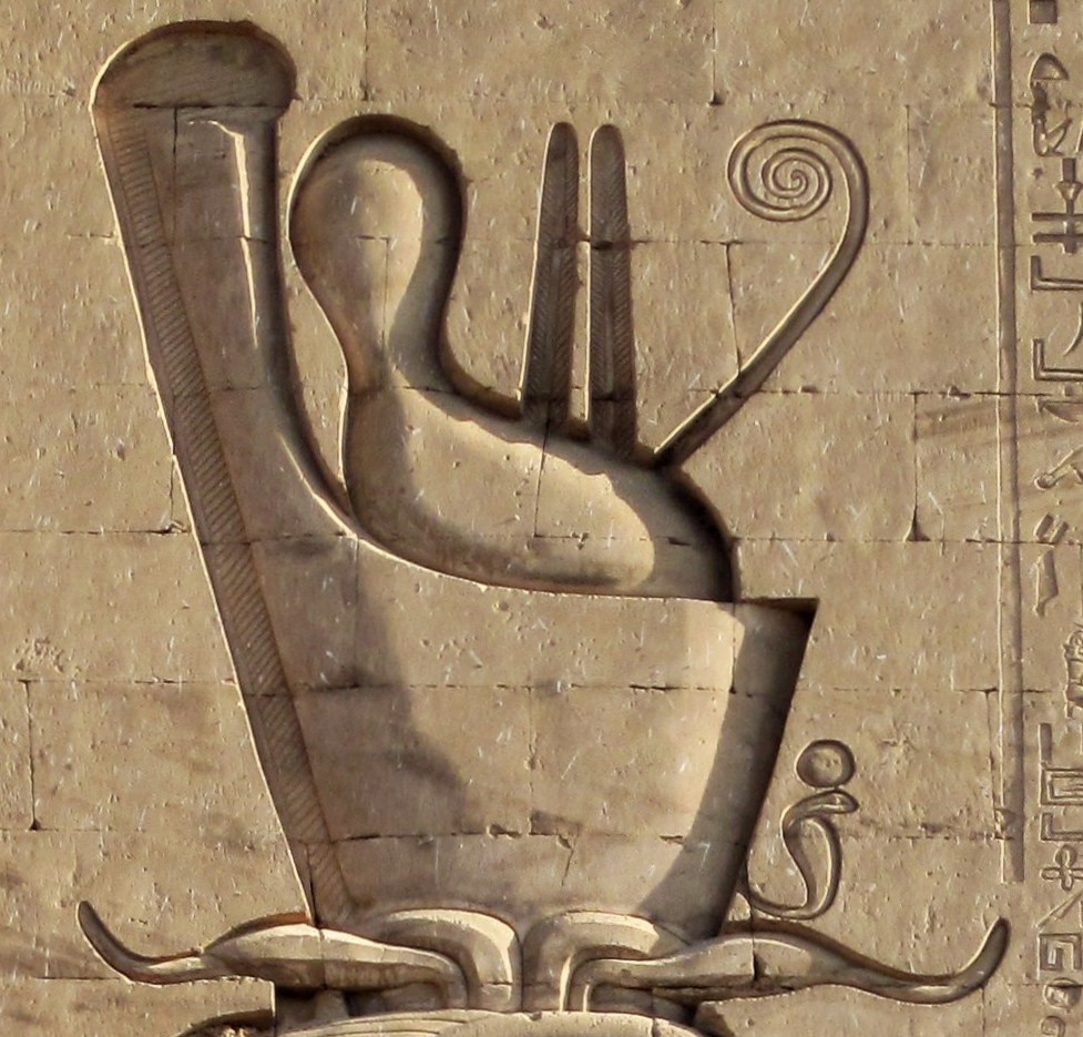 Doppelfederkrone (Hepti-Krone) (Relief am rechten Turm des Tempelpylons von Edfu, Ägypten)